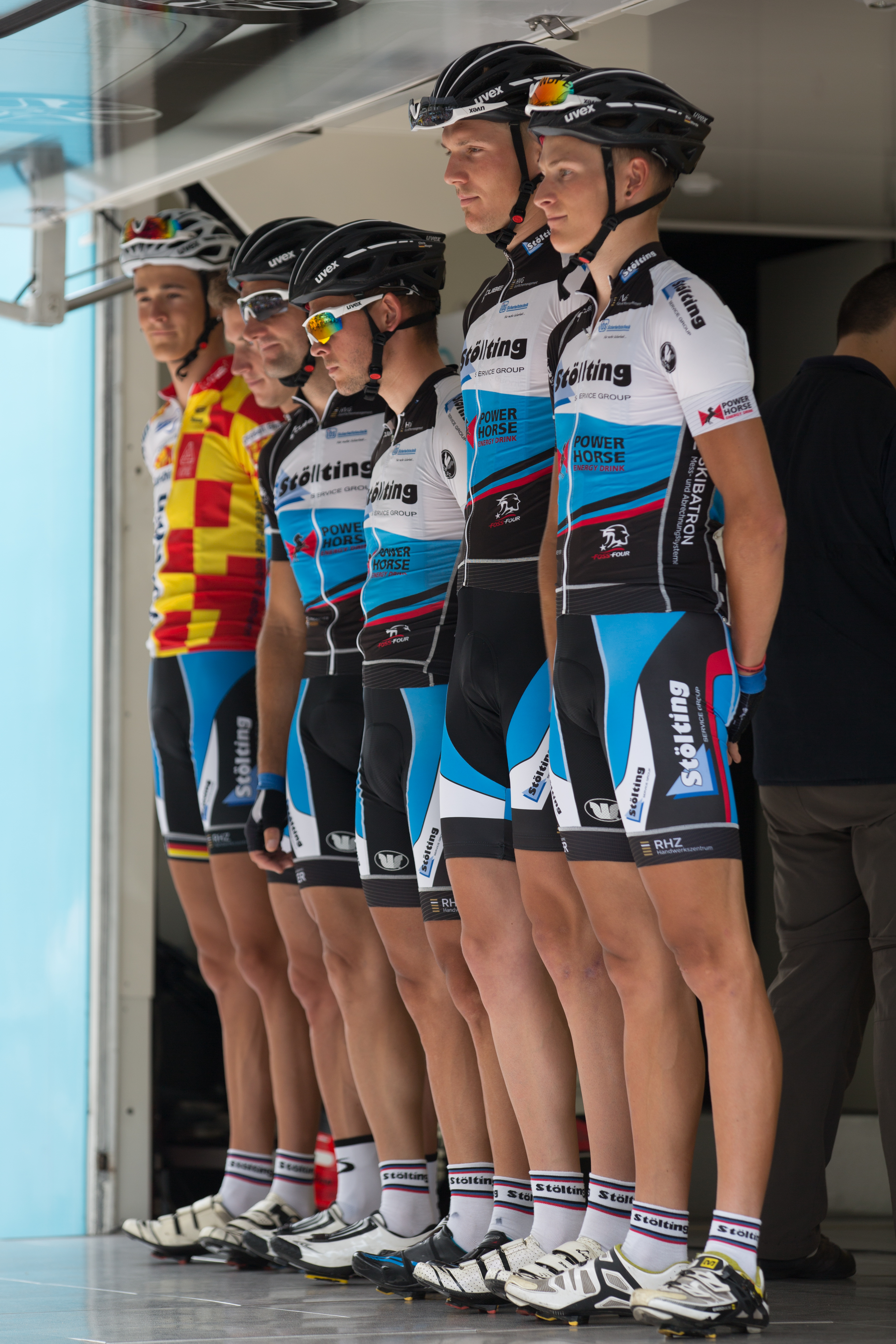 Tour Alsace 2013 l’équipe allemande Stölting